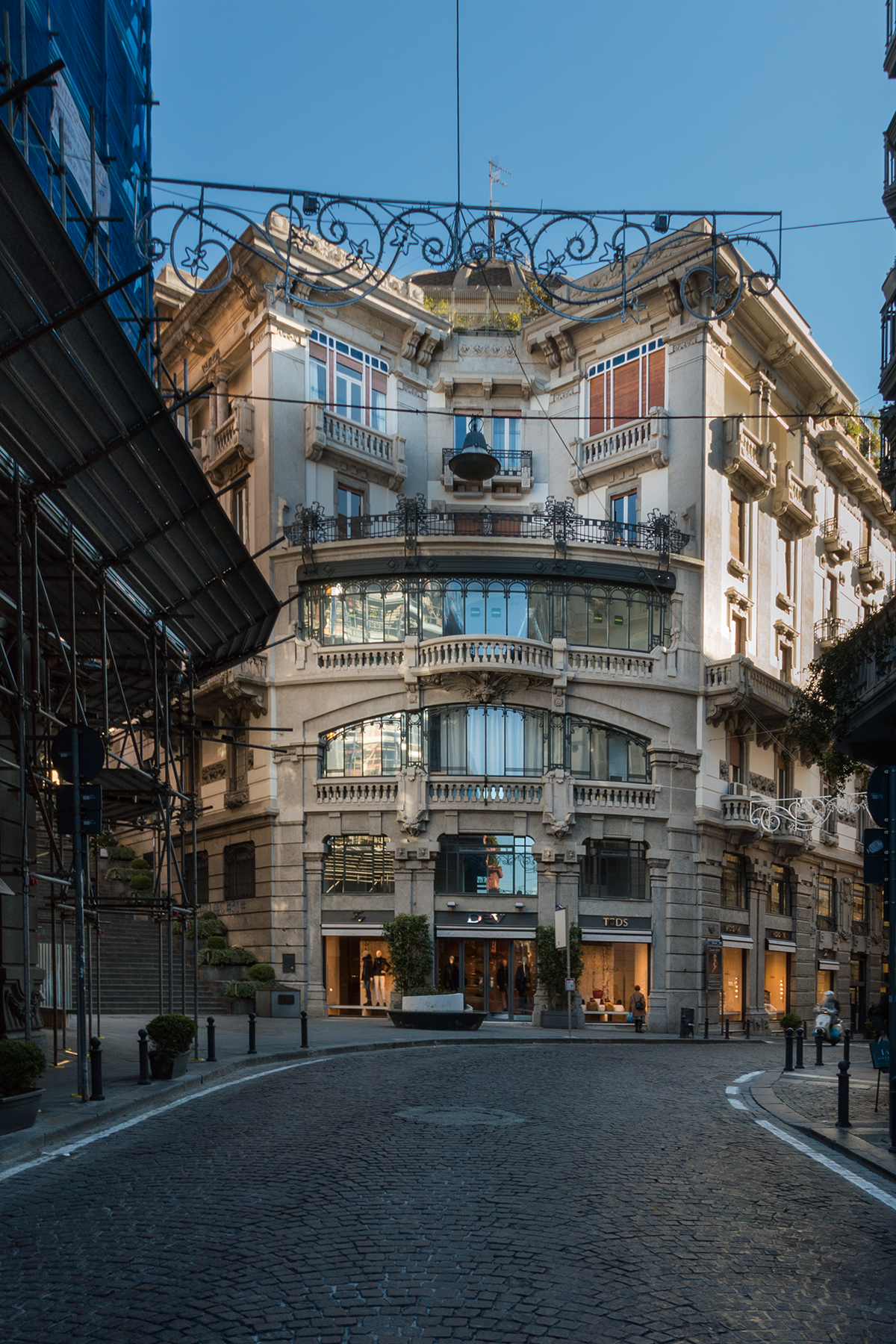 Prospetto d'angolo di palazzo Mannajuolo